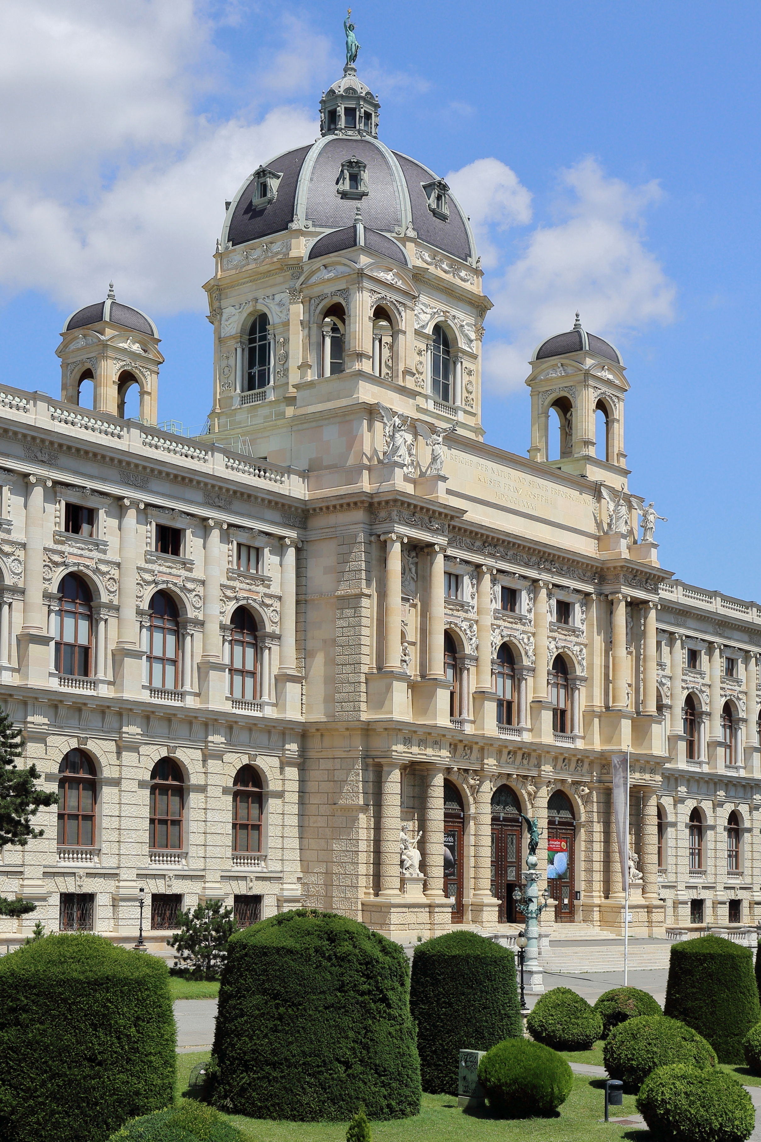 Hauptportal mit dem Mittelrisalit des Naturhistorischen Museums am Burgring im 1. Wiener Gemeindebezirk Inneres Stadt.Das Bauwerk im Stil der italienischen Renaissance ist mit dem Kunsthistorischen Museum symmetrisch zueinander angeordnet und äußerlich spiegelgleich. Es wurde von 1872 bis 1881 von Gottfried Semper und Carl von Hasenauer (nachdem Semper 1876 Wien verlassen hatte, von ihm allein) im Rohbau fertiggestellt und am 10. August 1889 eröffnet. Das viergeschossige Gebäude (Tief-, Hochparterre, I. und II. Stock) mit zwei Innenhöfen ist 170 m lang, im Mittelteil 70 m breit und außen mit rund 250 Bildwerken geschmückt. Die Attika des vorspringenden Mittelrisalit ist 32 m hoch und wird von einer rund 30 m hohen achteckigen Kuppel überragt, auf deren Laterne eine etwa 5 m hohe bronzene Statue des griechischen Sonnengottes Helios von Johannes Benk steht.